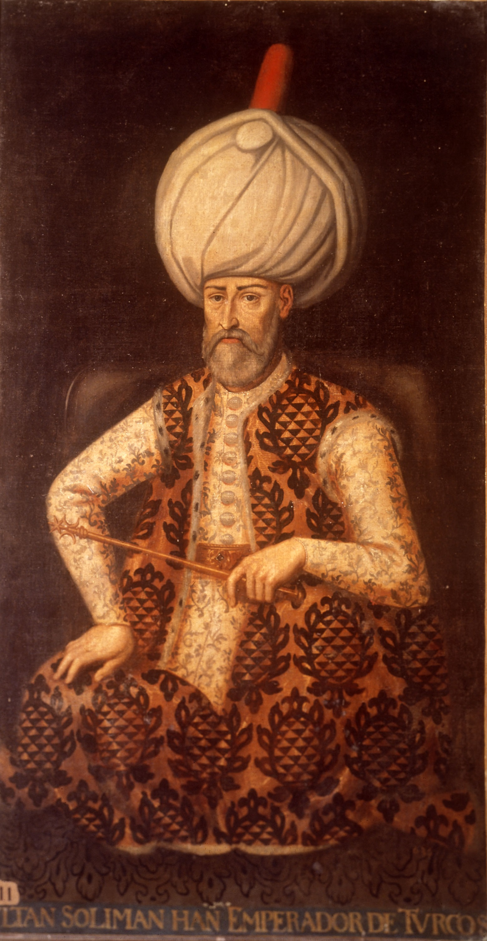 Retrato del sultan Solimán I el Magnífico, sultán otomano de 1520 a 1566. Es una obra anónima de la escuela italiana.